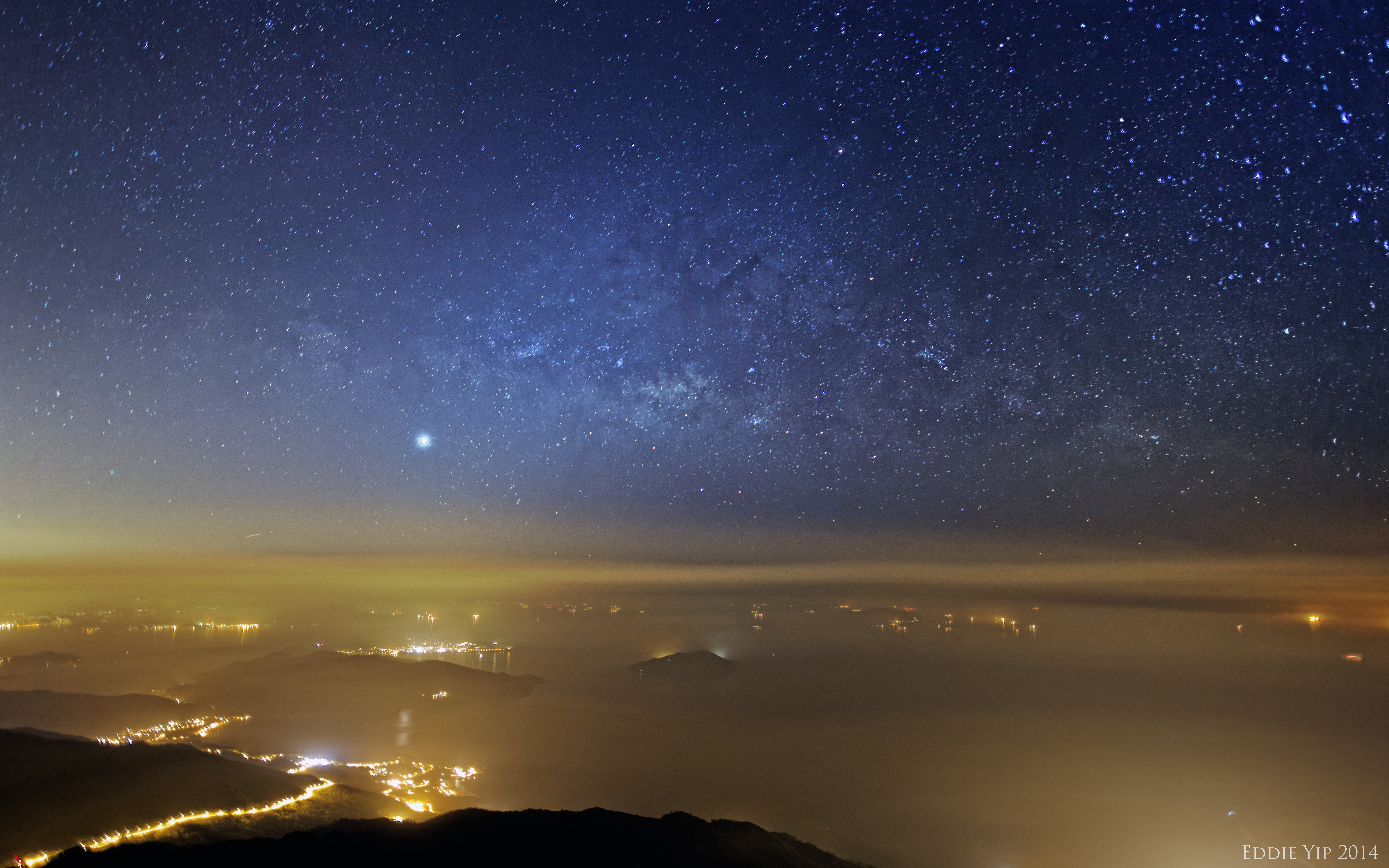 夏季銀河東升